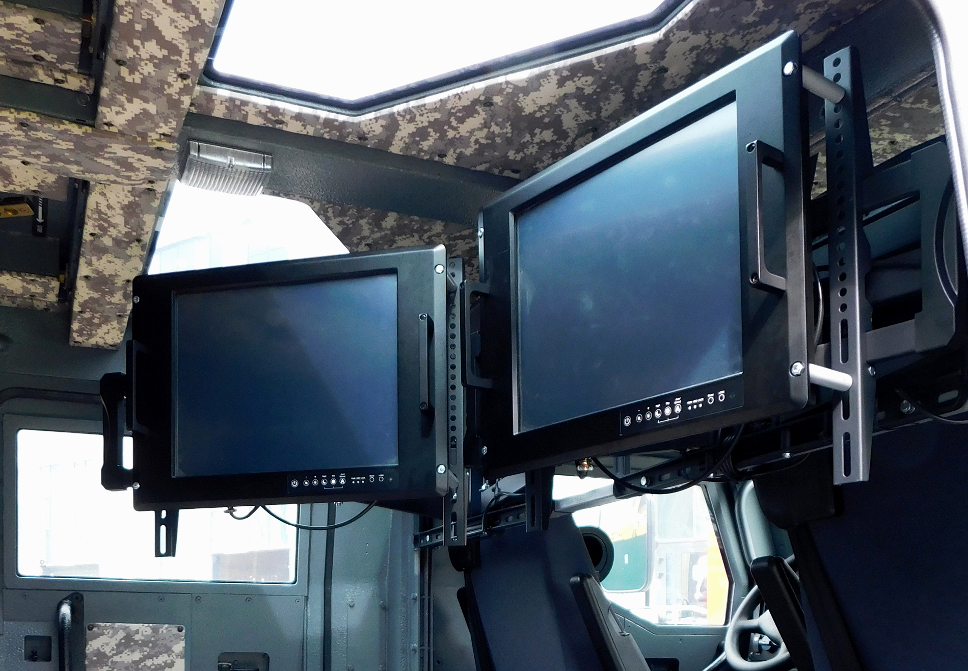 Автоматизированная система управления (АСУ) «Альянс» интегрированная в реактивную систему залпового огня (РСЗО) "Флейта". Устанавливается в ЛБА «Асилок». Белорусская разработка 2019 года